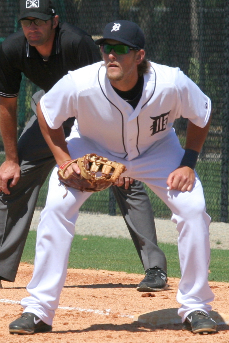 Jordan Lennerton